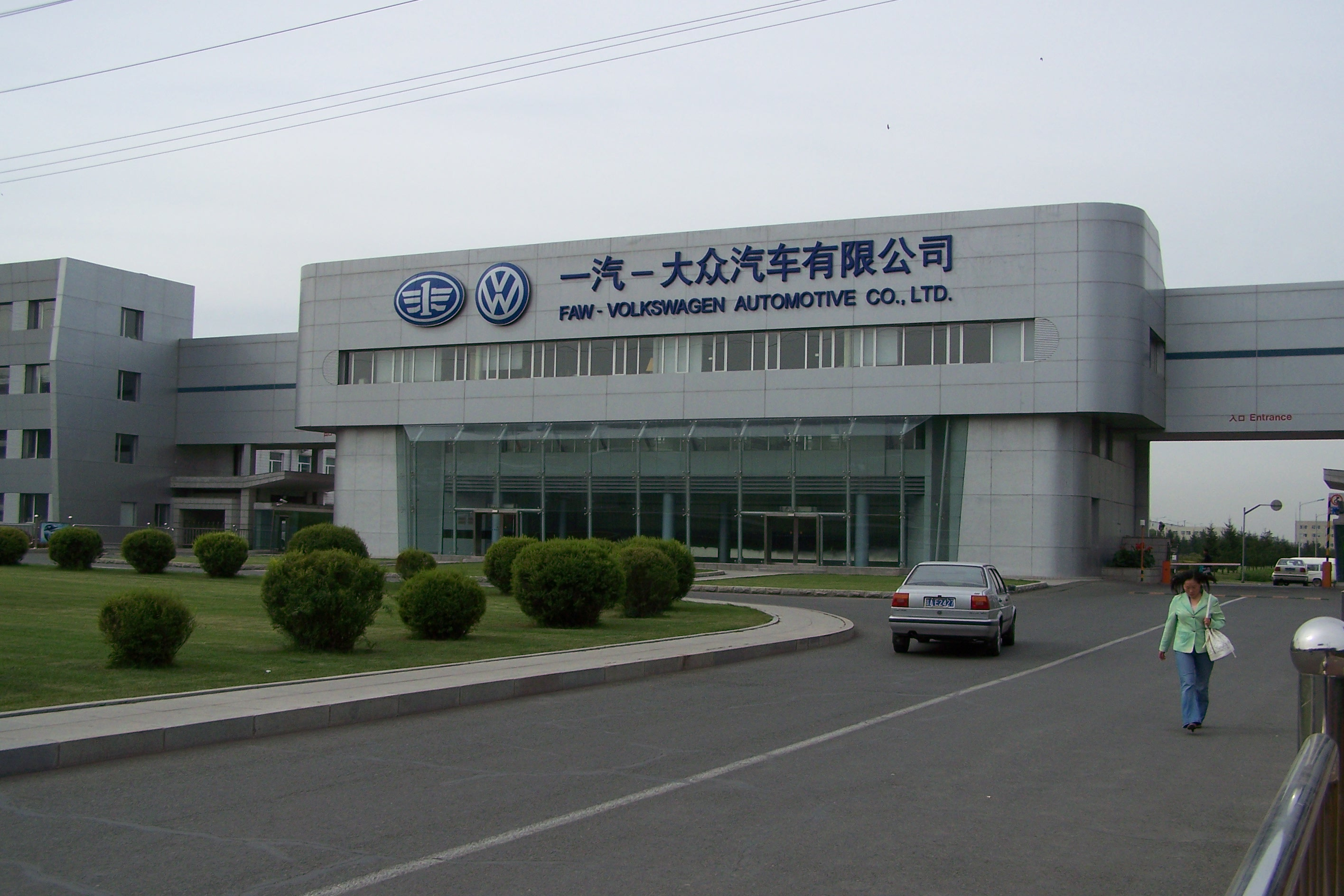 一汽大众206门